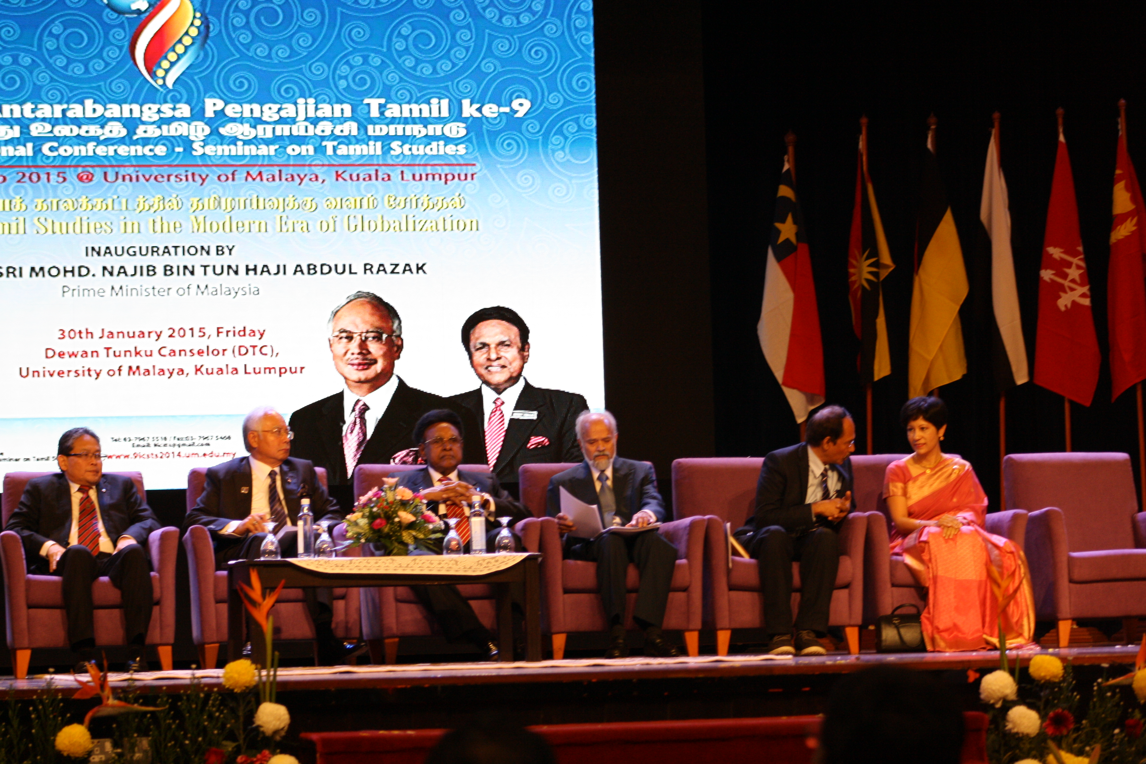 Opening ceremony of International Tamil Research Conference. The conference was officially opened by The Prime Minister of Malaysia.